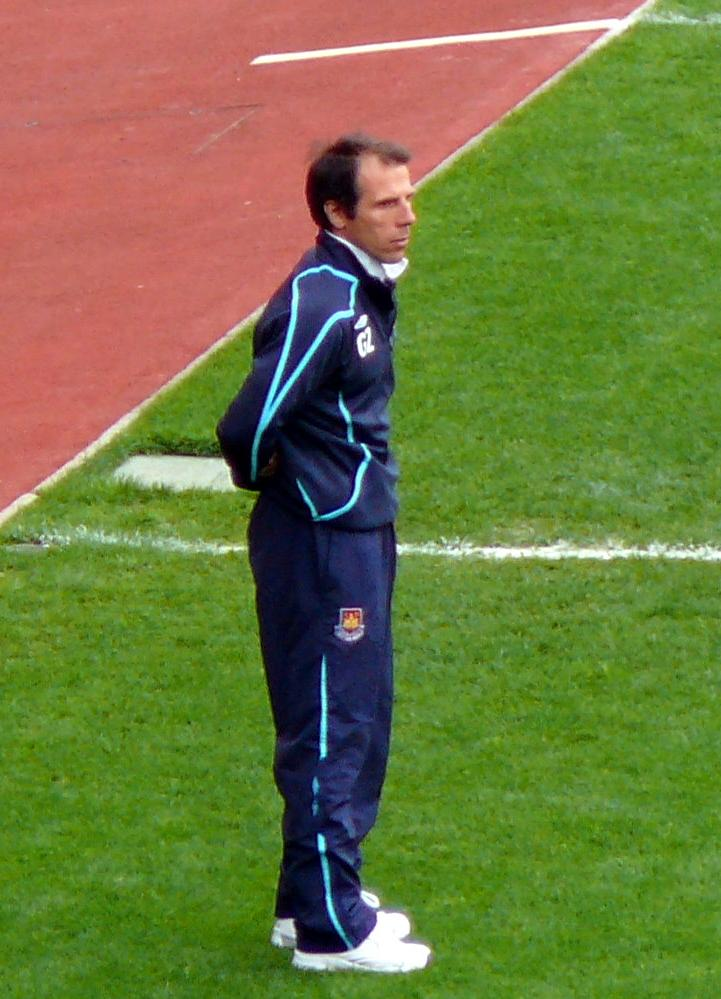 Gianfranco Zola & Liverpool manager Rafael Benítez Upton Park